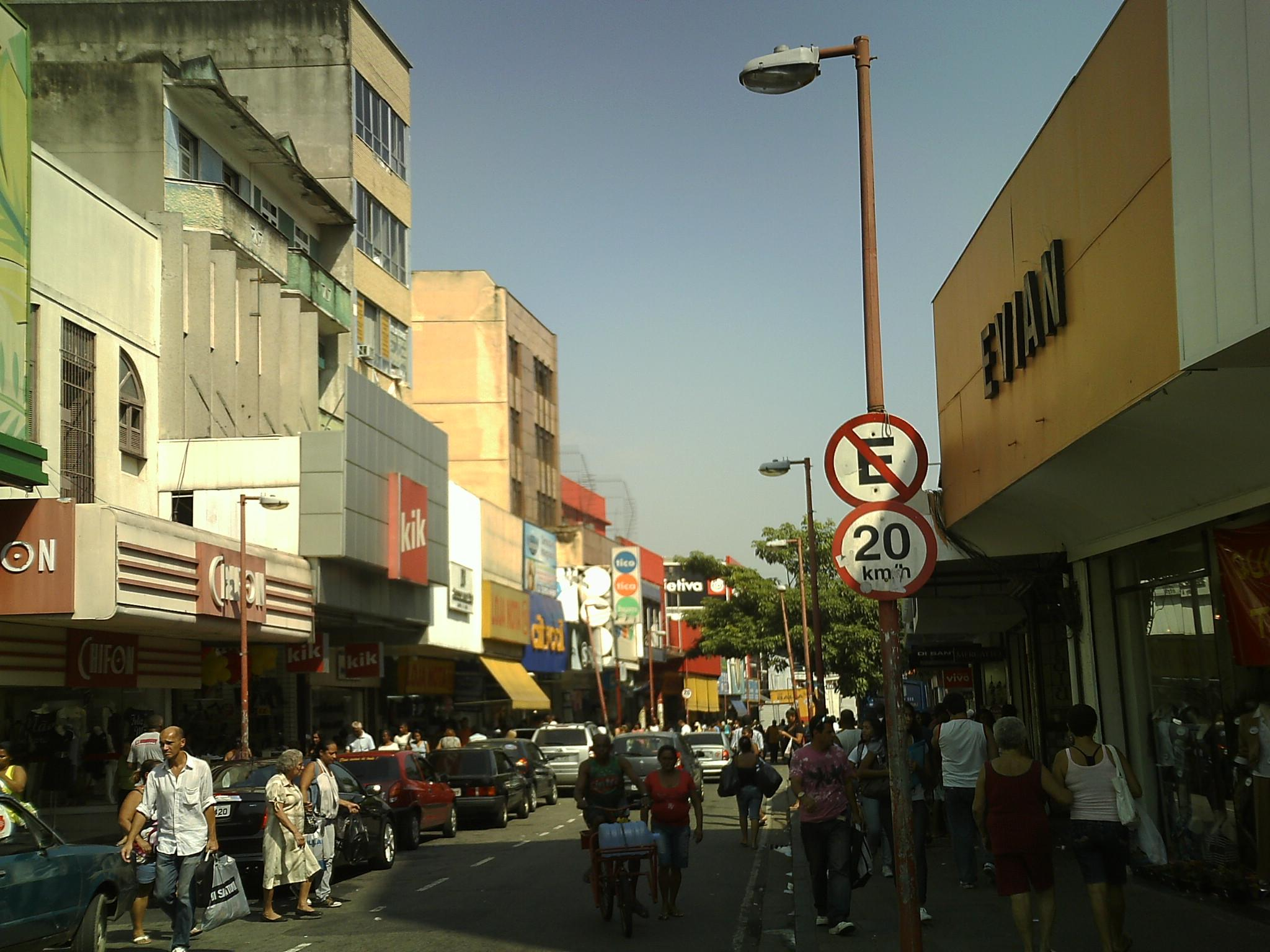 Avenida Ministro Edgar Romero (por vezes tb chamada Edgard Romero), em Madureira. Área próxima a Escola Municipal Ministro Edgar Romero, na parte do meio de Madureira, entre as duas estações de trem.